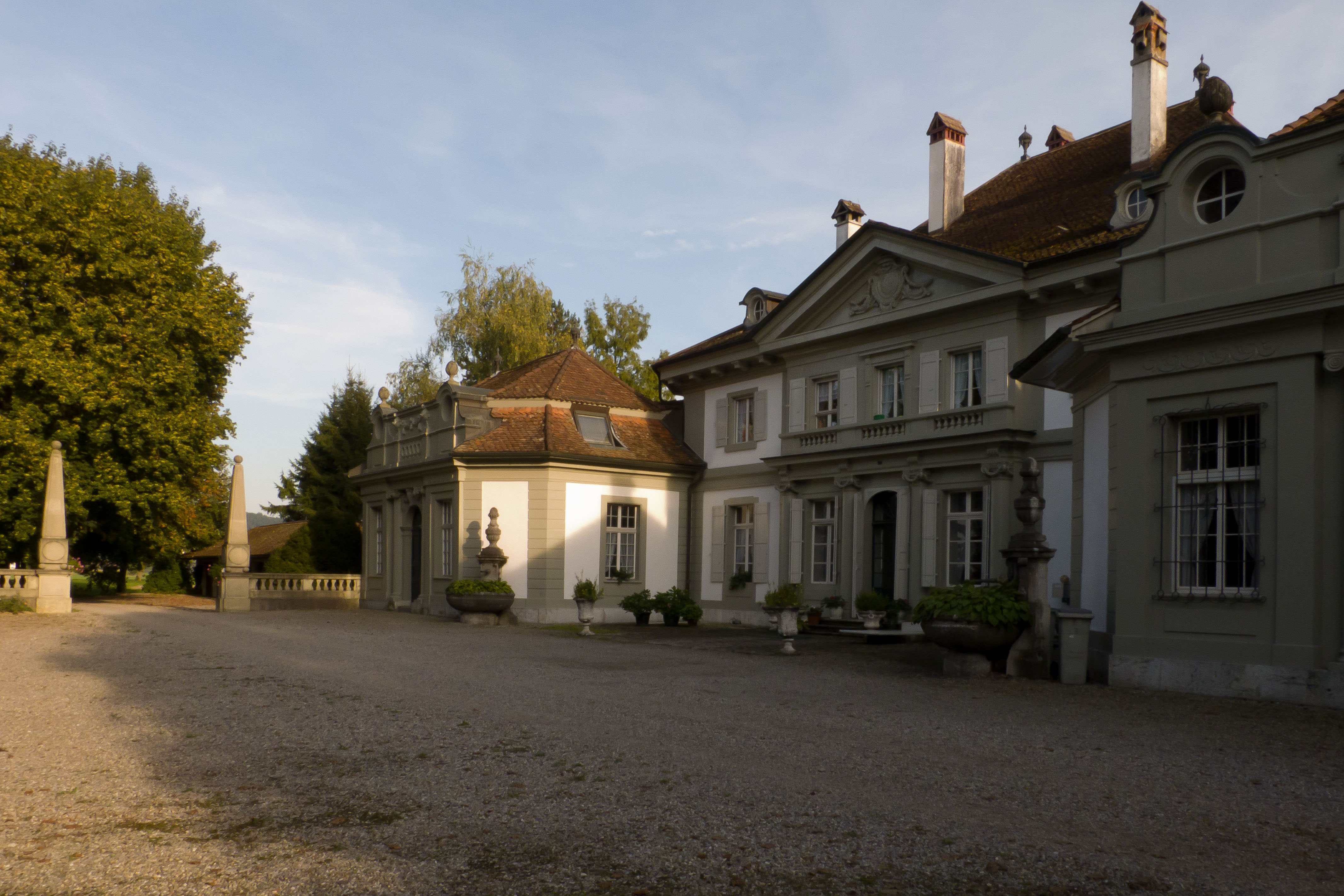 Kirchberg, Kleehof, Vorfahrt von West